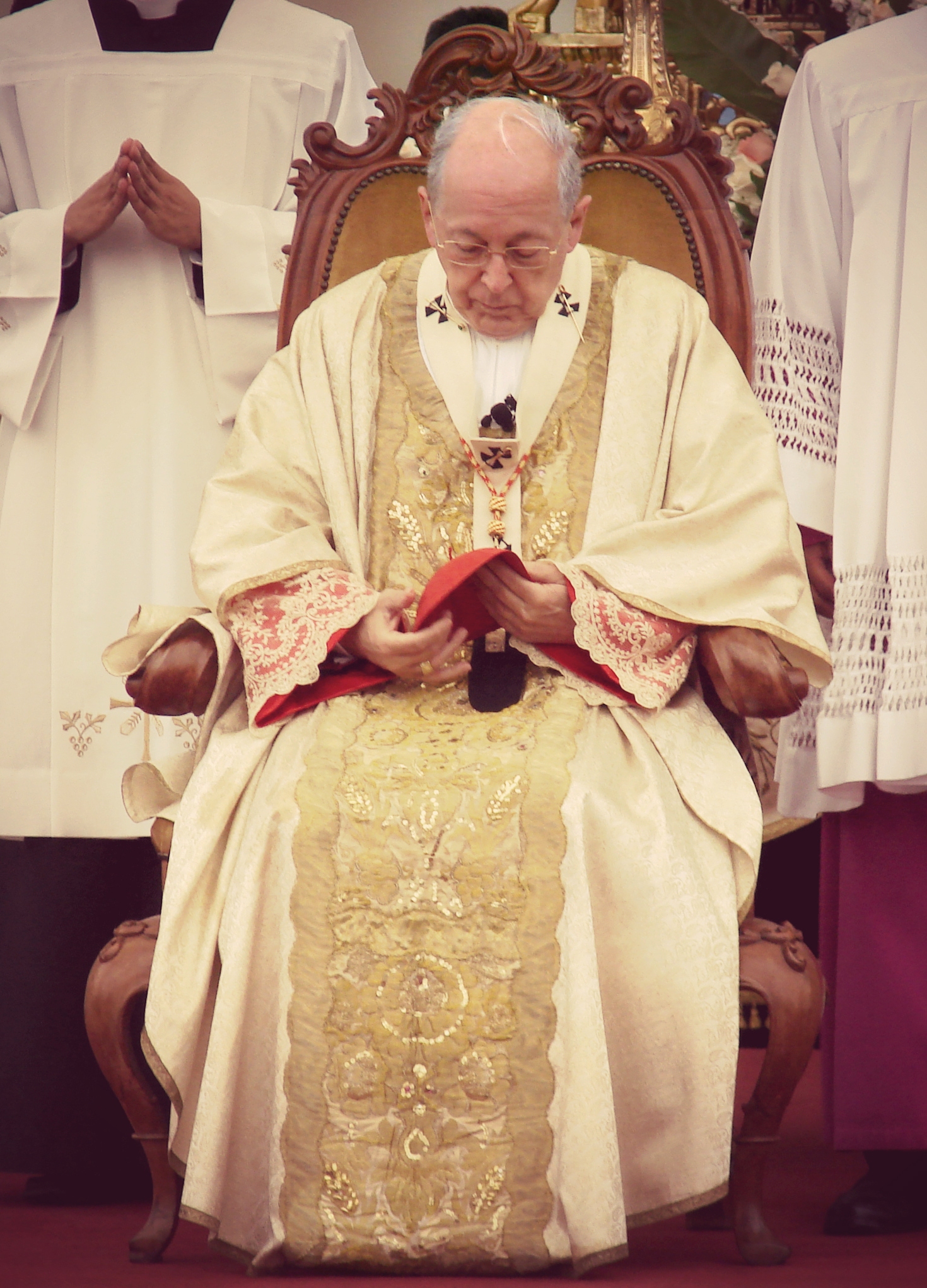 El Cardenal orando en la misa por el año jubilar de los 400 años del fallecimiento de Santa Rosa de Lima.